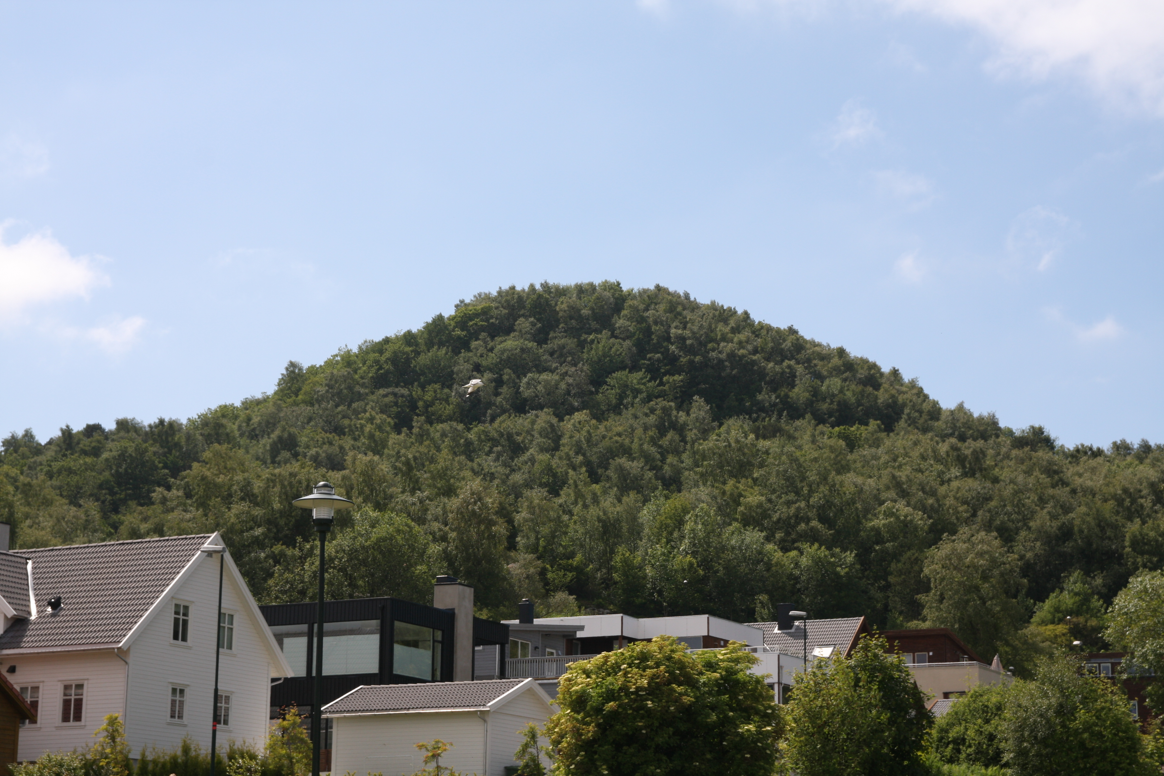 Jåttånuten